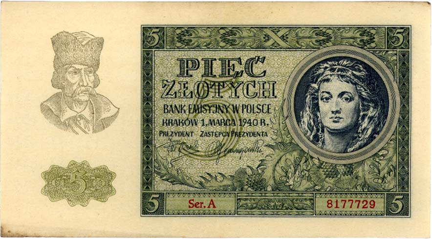 5 złotych = 2,50 Reichsmark